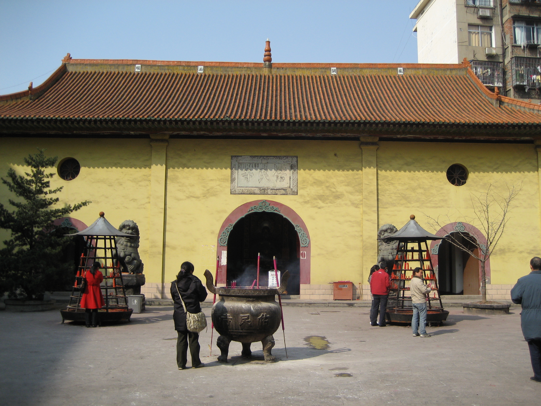 由山门改建来的佑民寺天王殿